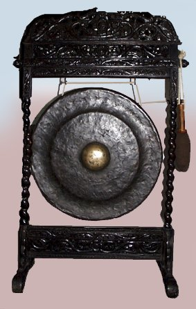 Malaiischer Gong aus der Emil Helfferich-Sammlung im Ostasieninstitut der Hochschule Ludwigshafen am Rhein